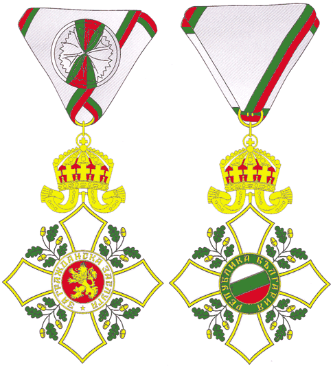 Орден "За гражданска заслуга" I степен